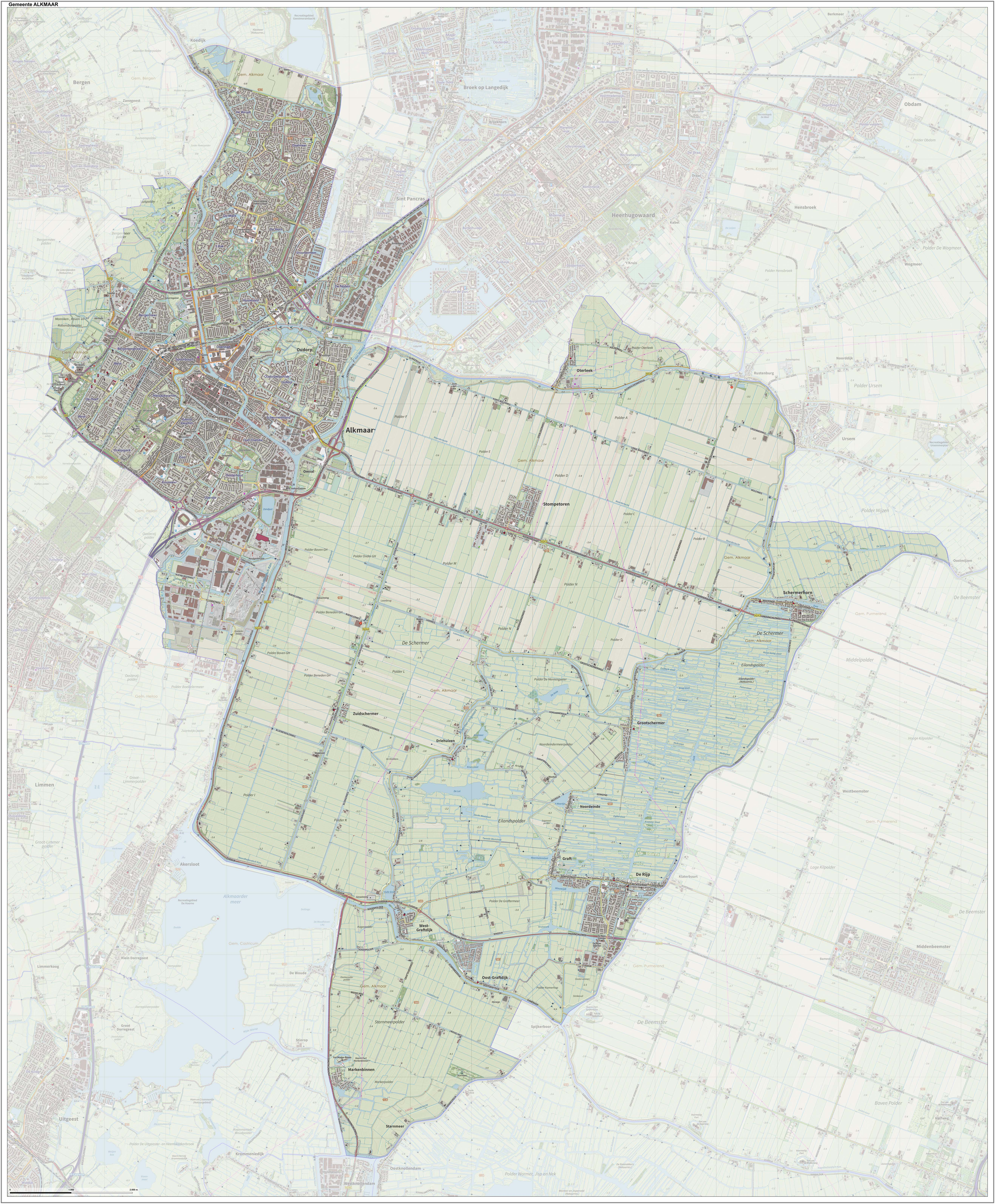 Topografische gemeentekaart. Resolutie: 400 pixels/km. Kaartbeeld samengesteld uit de open geodata van de Top10NL en Top25namen (Kadaster), Creative Commons-BY licentie. Gebouwvlakken uit open geodata BAG extract. Wegen uit de OpenStreetMap, OpenStreetMap community. Reliëfschaduw uit de Actuele Hoogtekaart AHN2. Samenstelling en kleurenschema: Jan-Willem van Aalst, met QGIS. Zie ook de Legenda.